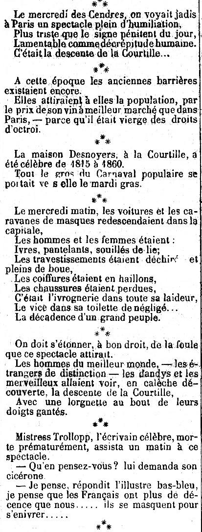 Extrait de l'éditorial du Petit journal, une partie des propos qu'il contient, traitant de la Descente de la Courtille.